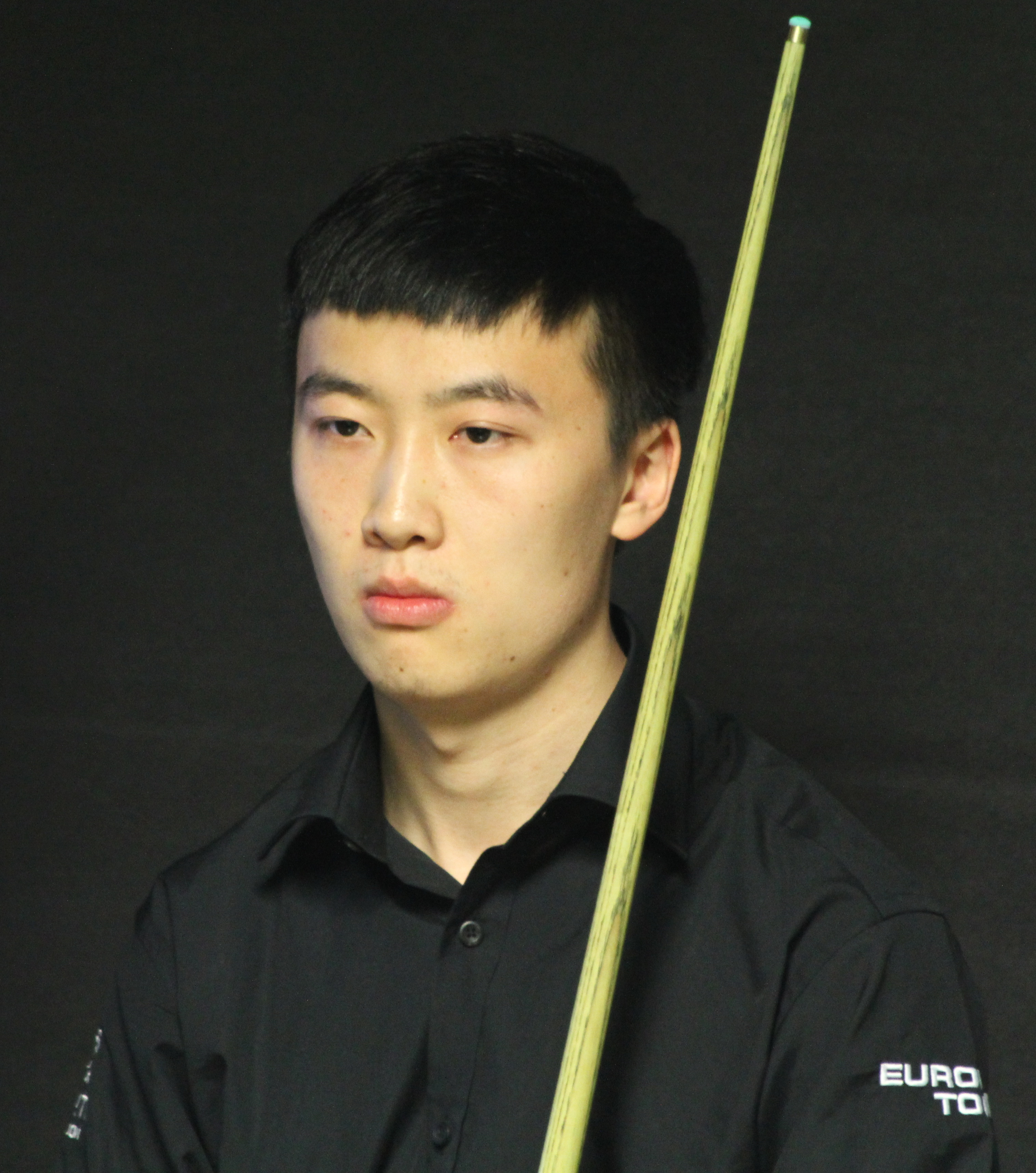 Lu Chenwei beim Paul Hunter Classic 2014